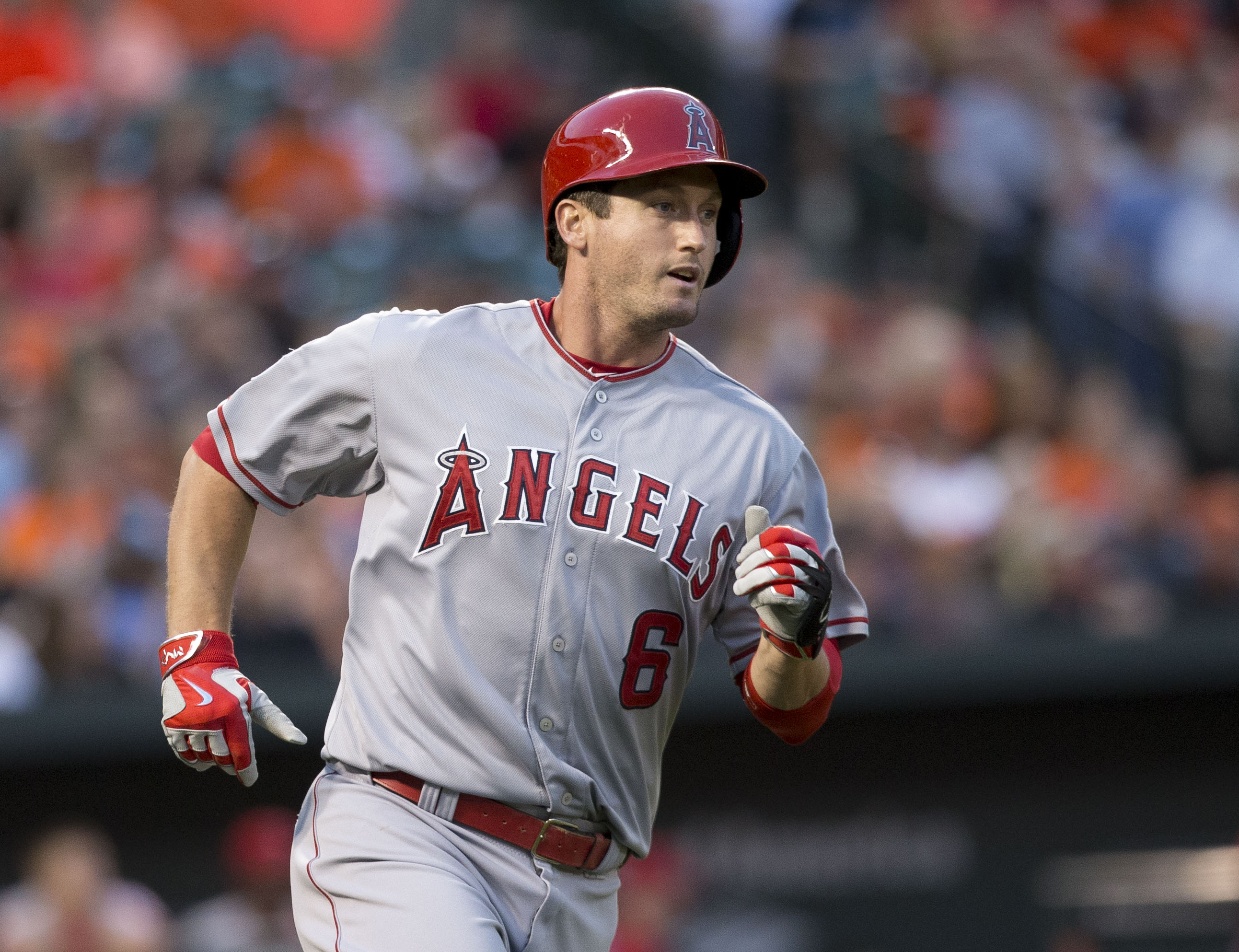 Angels at Orioles 5/15/15